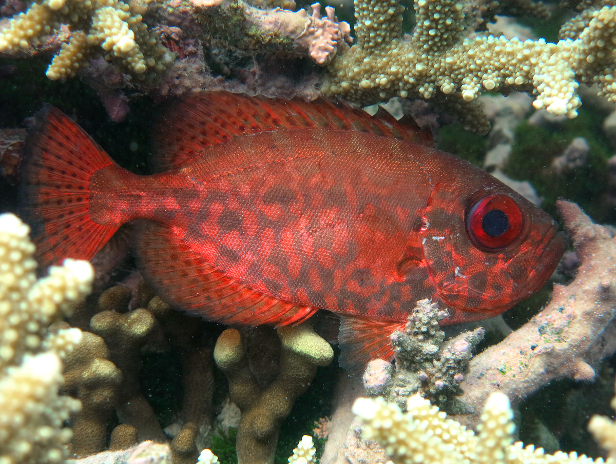 Un "soleil" (Heteropriacanthus cruentatus) à la Réunion.